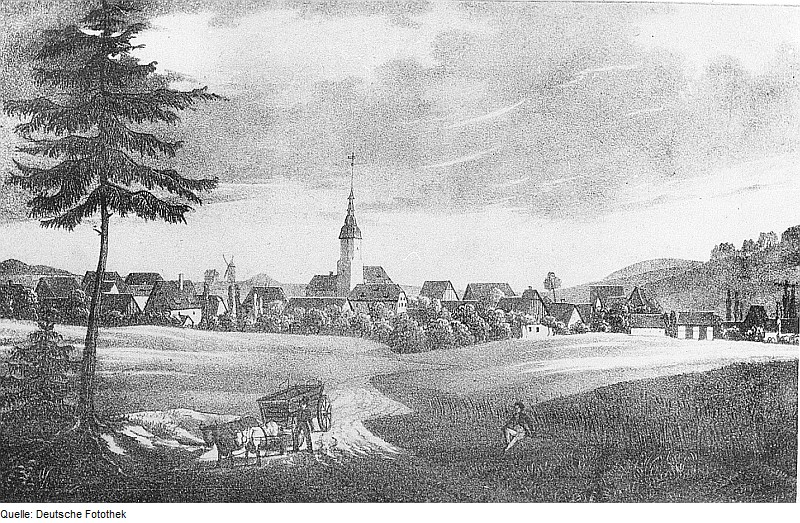 Original image description from the Deutsche Fotothek Bernstadt auf dem Eigen-Dittersbach auf dem Eigen. Ortsansicht mit Windmühle